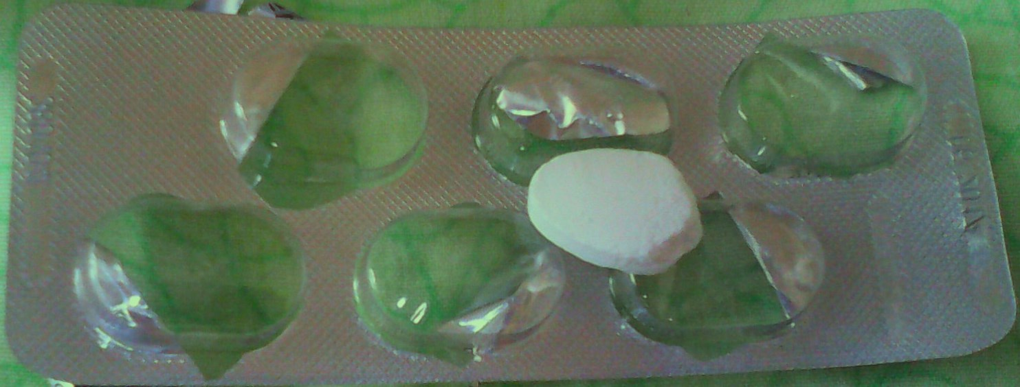 Разновидность таблеток - вагинальная таблетка (или суппозитории вагинальные прессованные). Непатентованное международное название - Деквалиния хлорид (Dequalinii chloridum). Коммерческое - Флуомизин (Fluomizin).